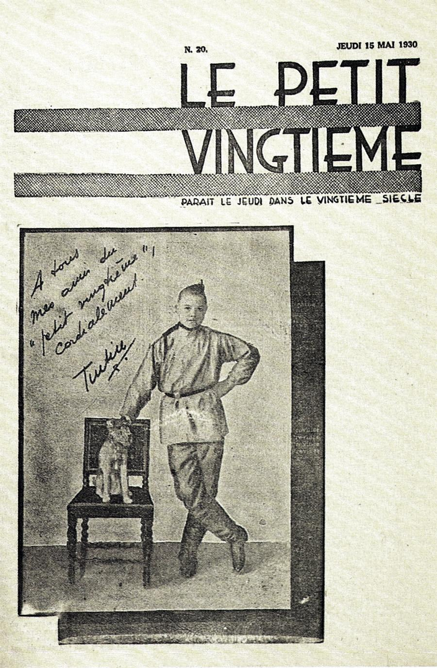 Portada del número 20 del suplemento infantil Le Petit Vingtième, publicado el 13 de mayo de 1930, que muestra una supuesta fotografía de Tintín y su perro Milú con una dedicatoria del primero.